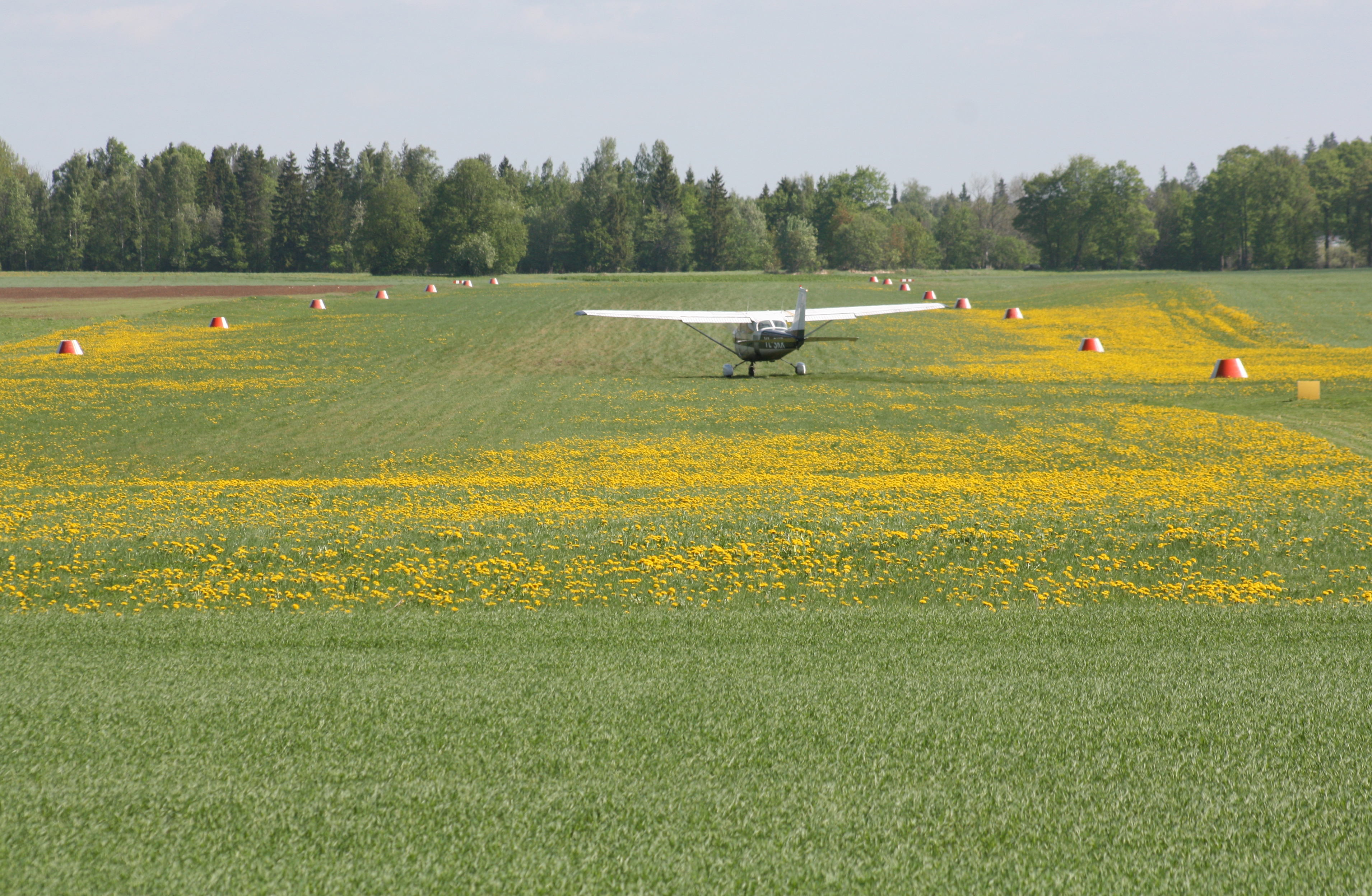 Cēsu lidlauks. Aerodrome